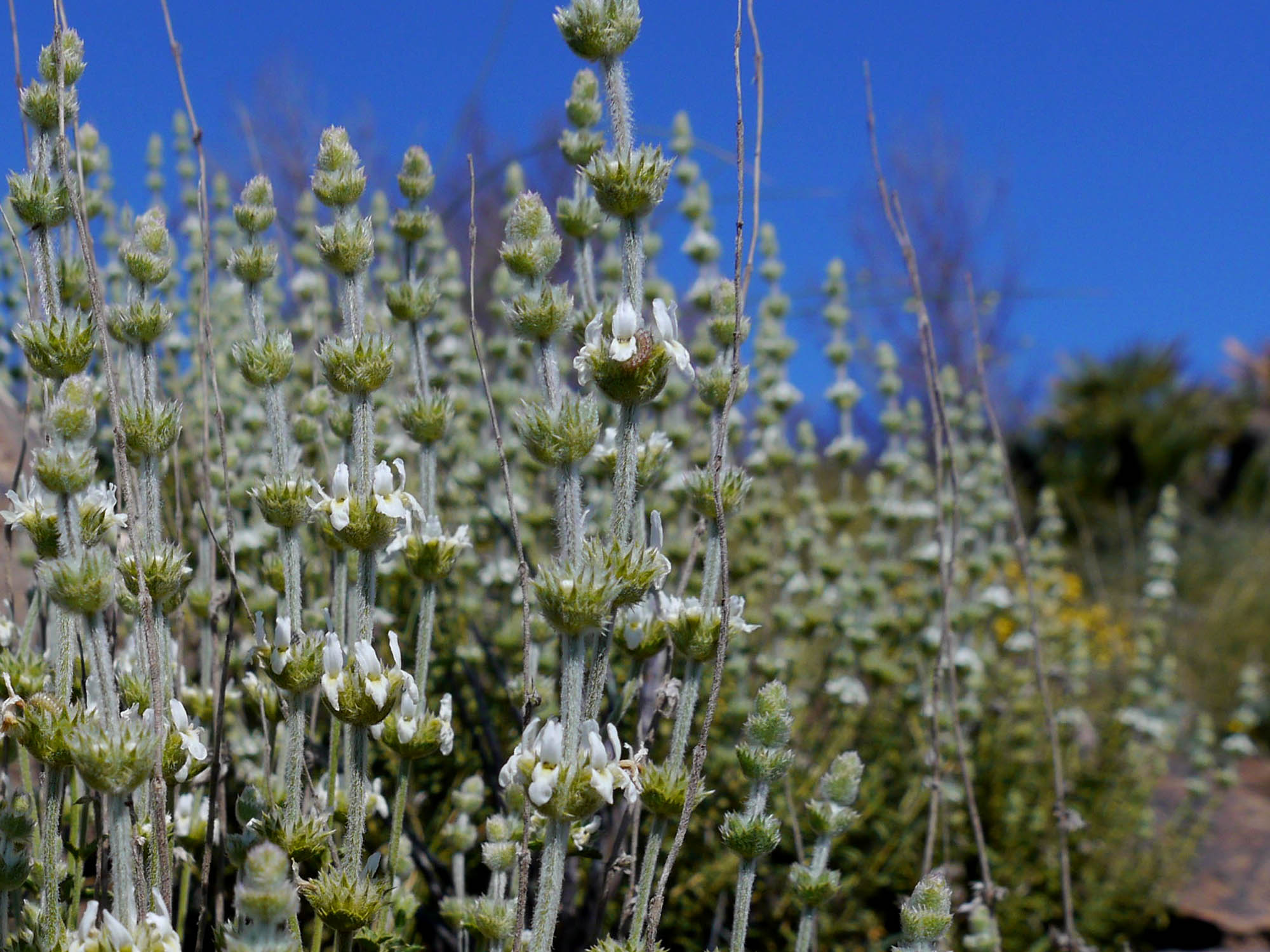 Sideritis pusilla subsp. carthaginensis en la Peña del Águila, Portmán (España).